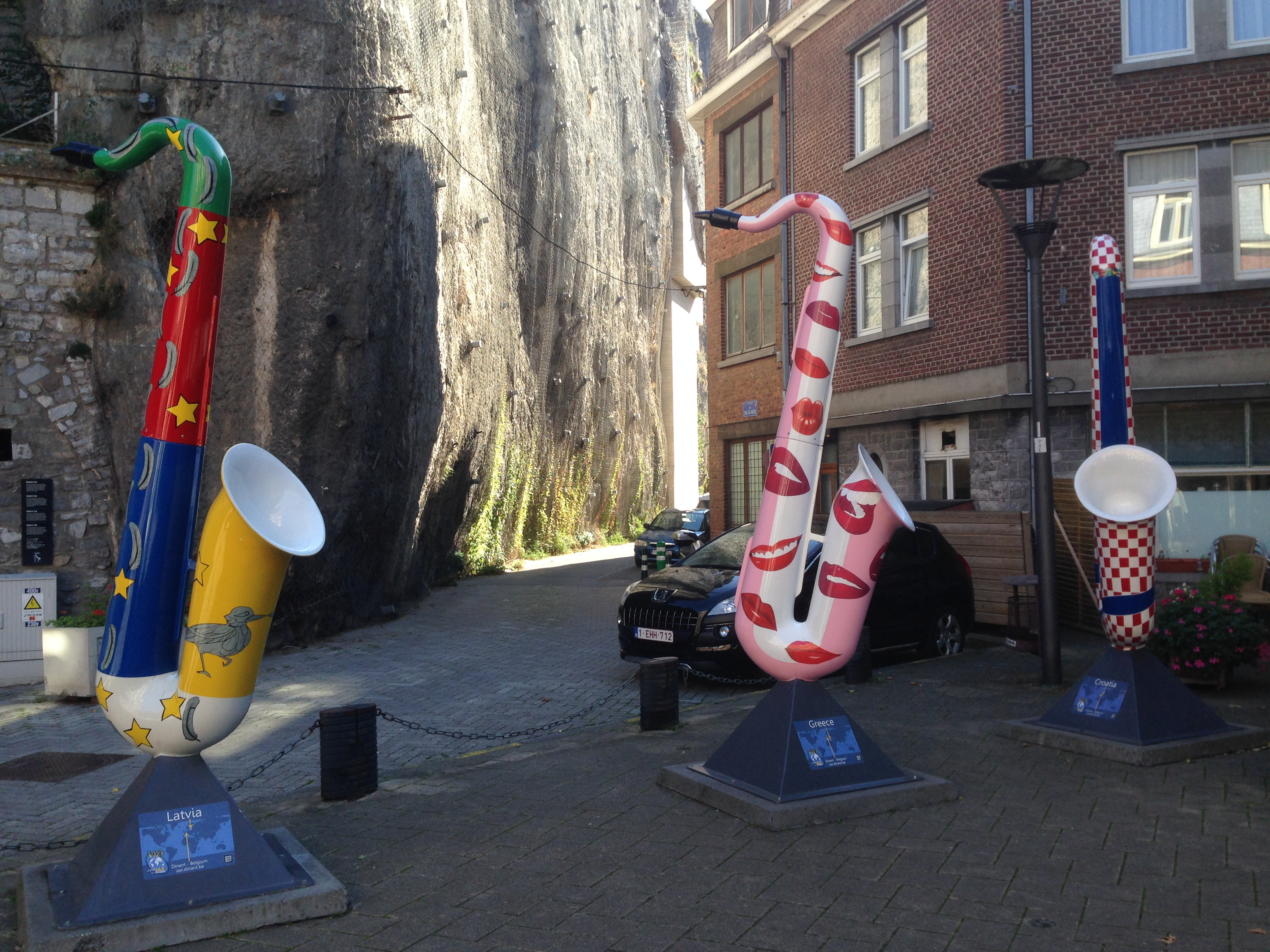 3 saxophones on a square in Dinant, Belgium